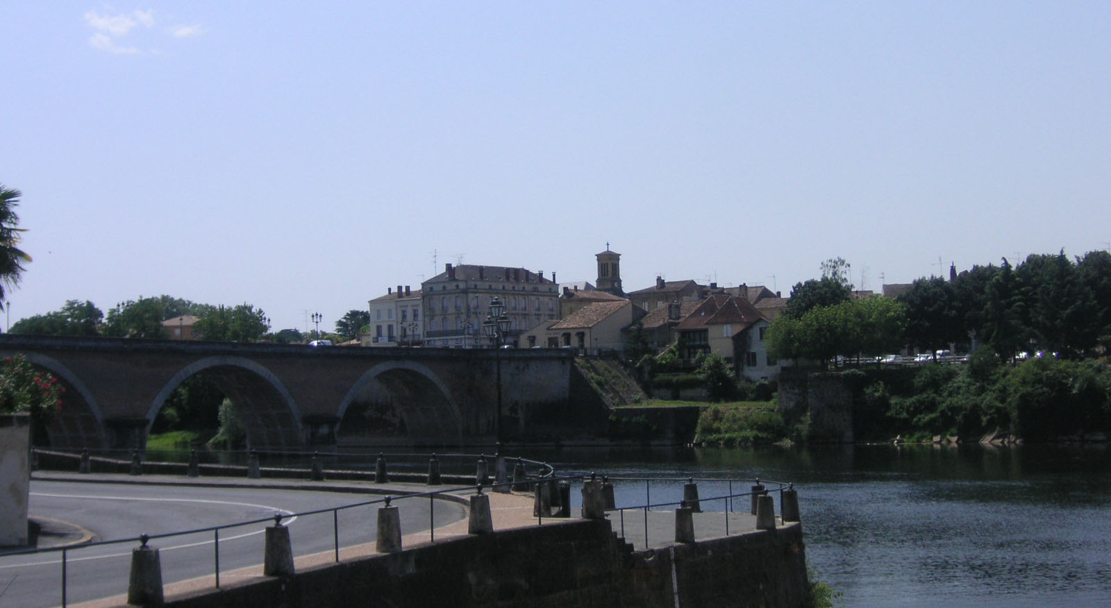 Bergerac, bord de dordogne, photo perso